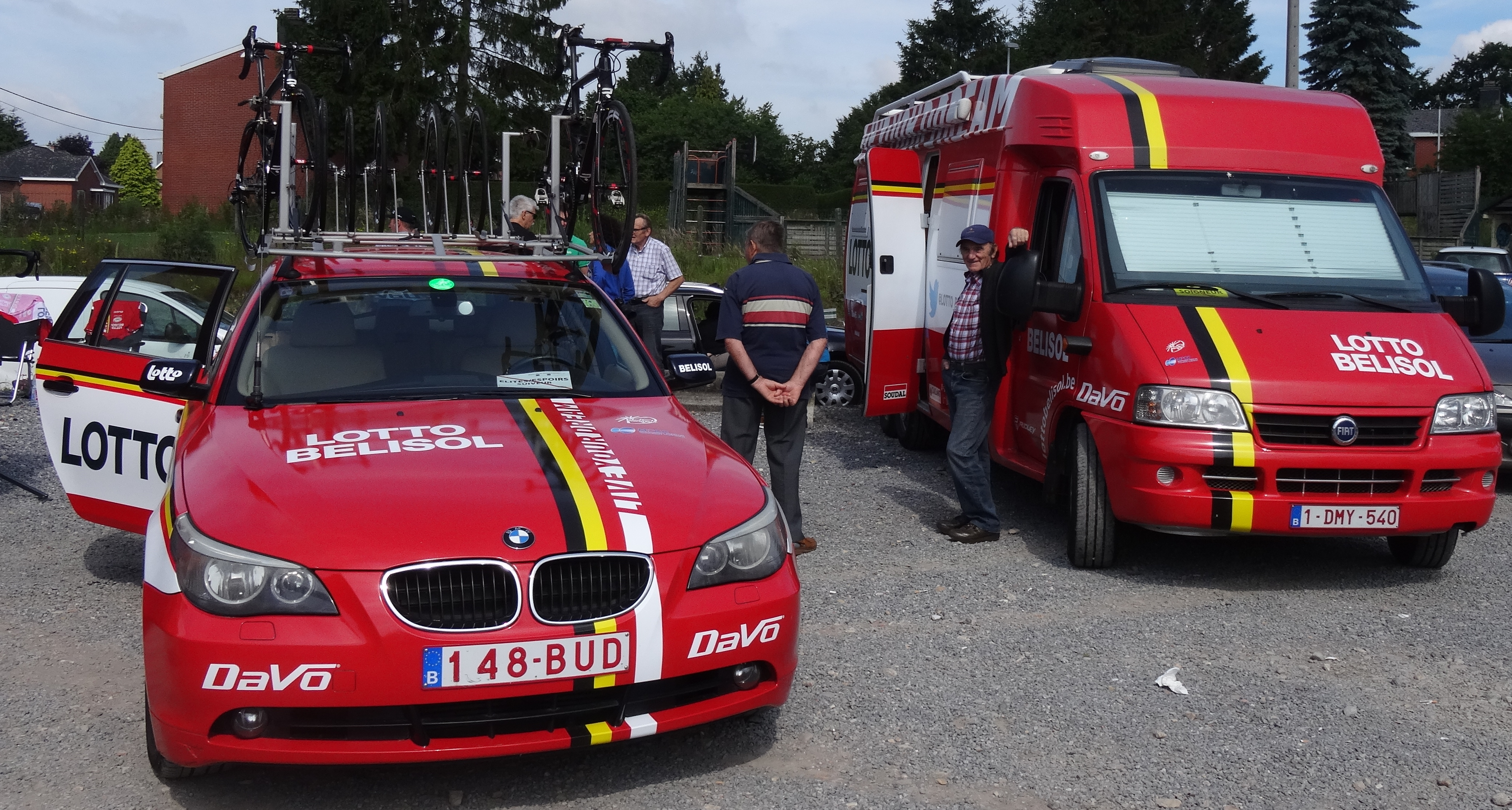 Reportage photographique réalisé le dimanche 22 juin à l'occasion du départ et de l'arrivée de la Flèche ardennaise 2014 à Herve, Belgique.